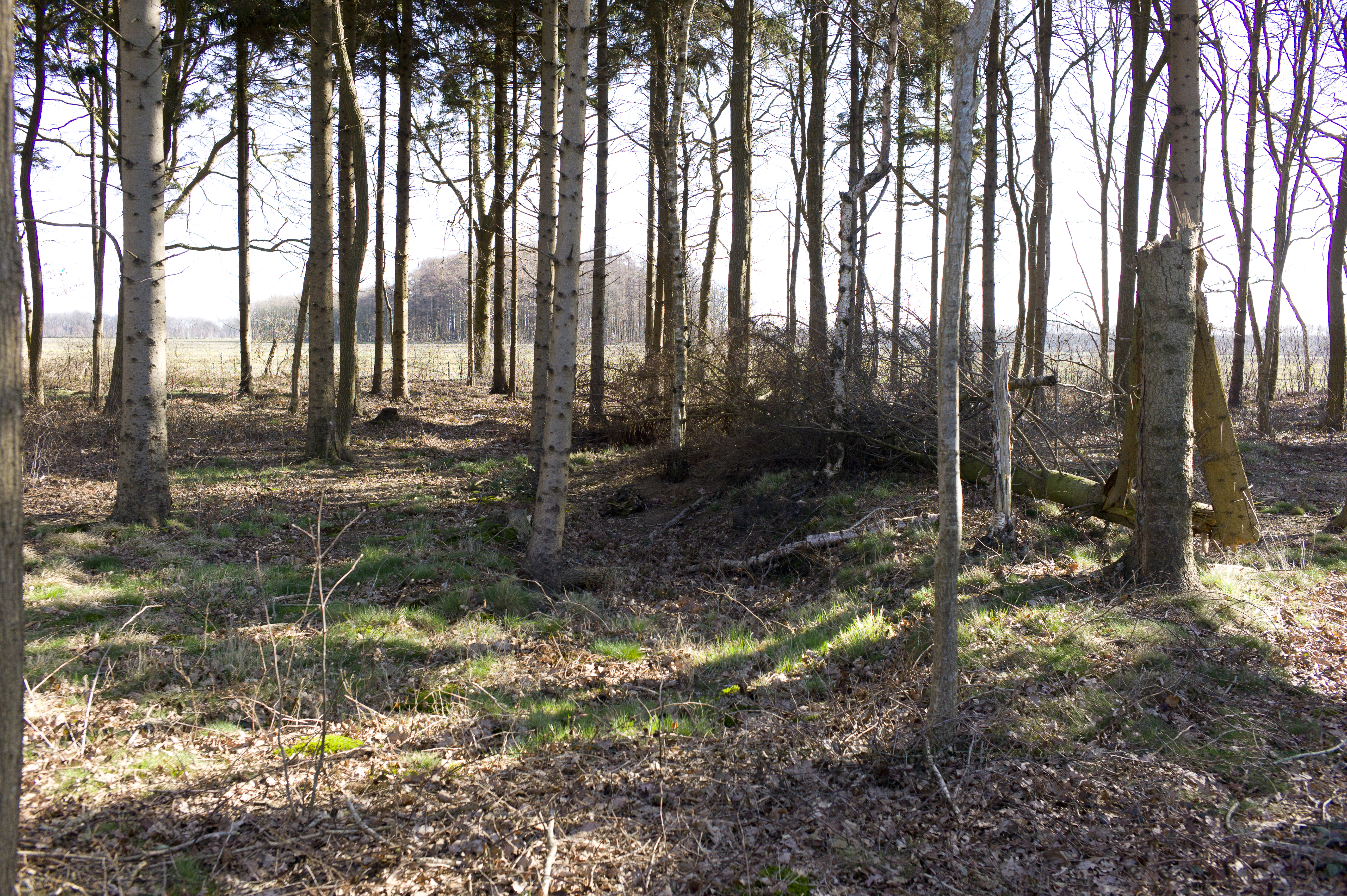 Tijdens de oorlogsjaren gebruikte de bezetter deze plaats voor opslag van brandstof voor voertuigen. Daartoe werden lange sleuven gegraven, waarin vaten met brandstof konden worden geplaatst. Enkele sleuven zijn ook nu nog herkenbaar. De plaats wordt in Peest aangeduid als het benzinebosje.